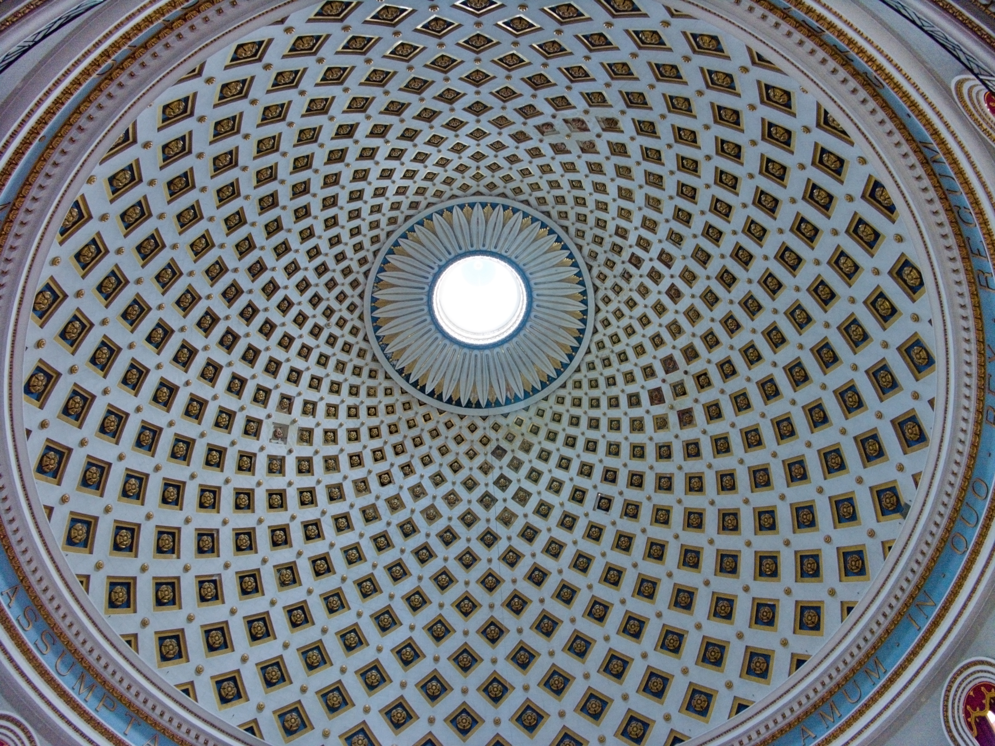 Motifs du dome de Mosta à Malte